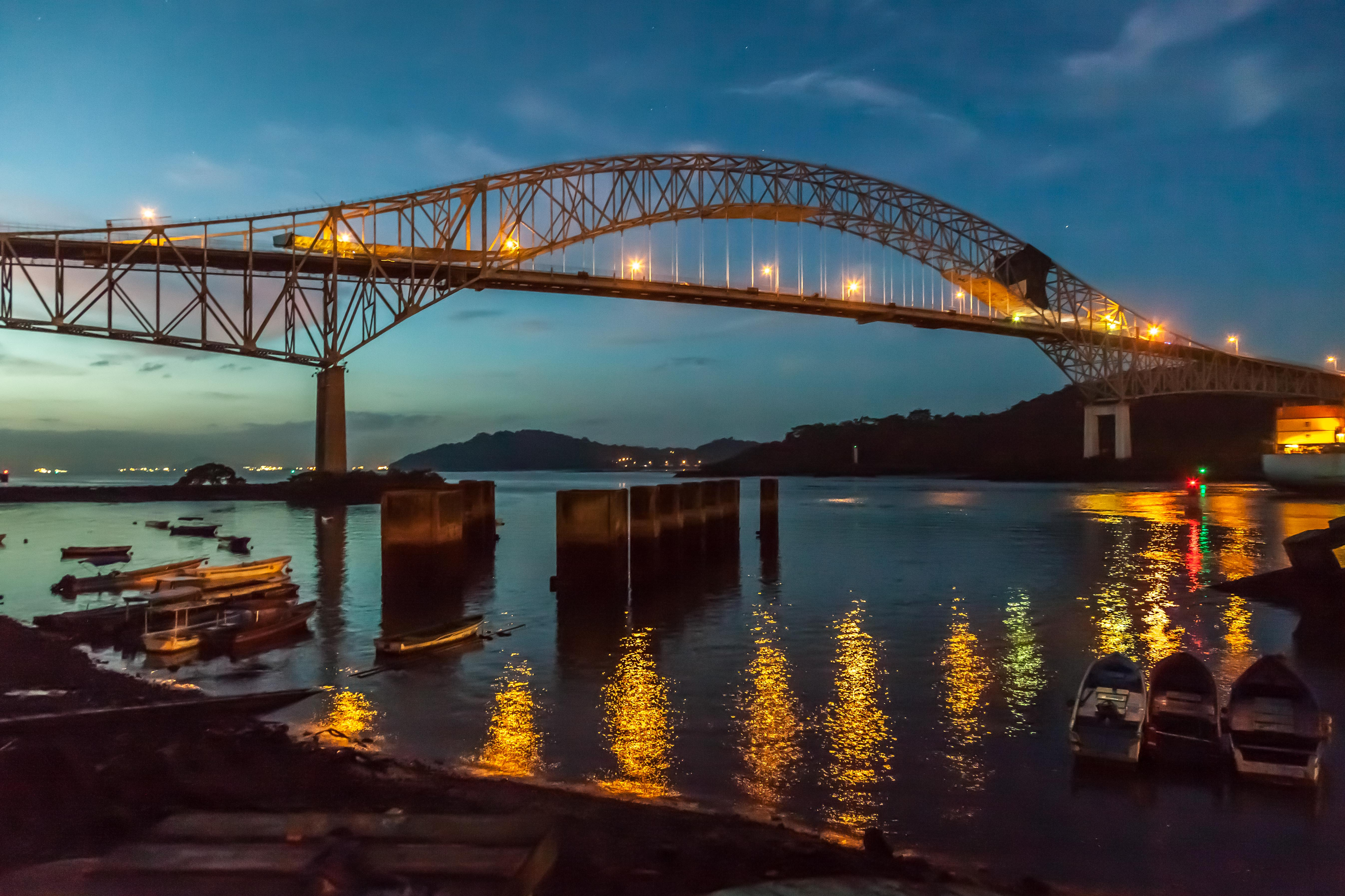 Puente de Las Américas fotografiado con las primeras luces del amanecer.